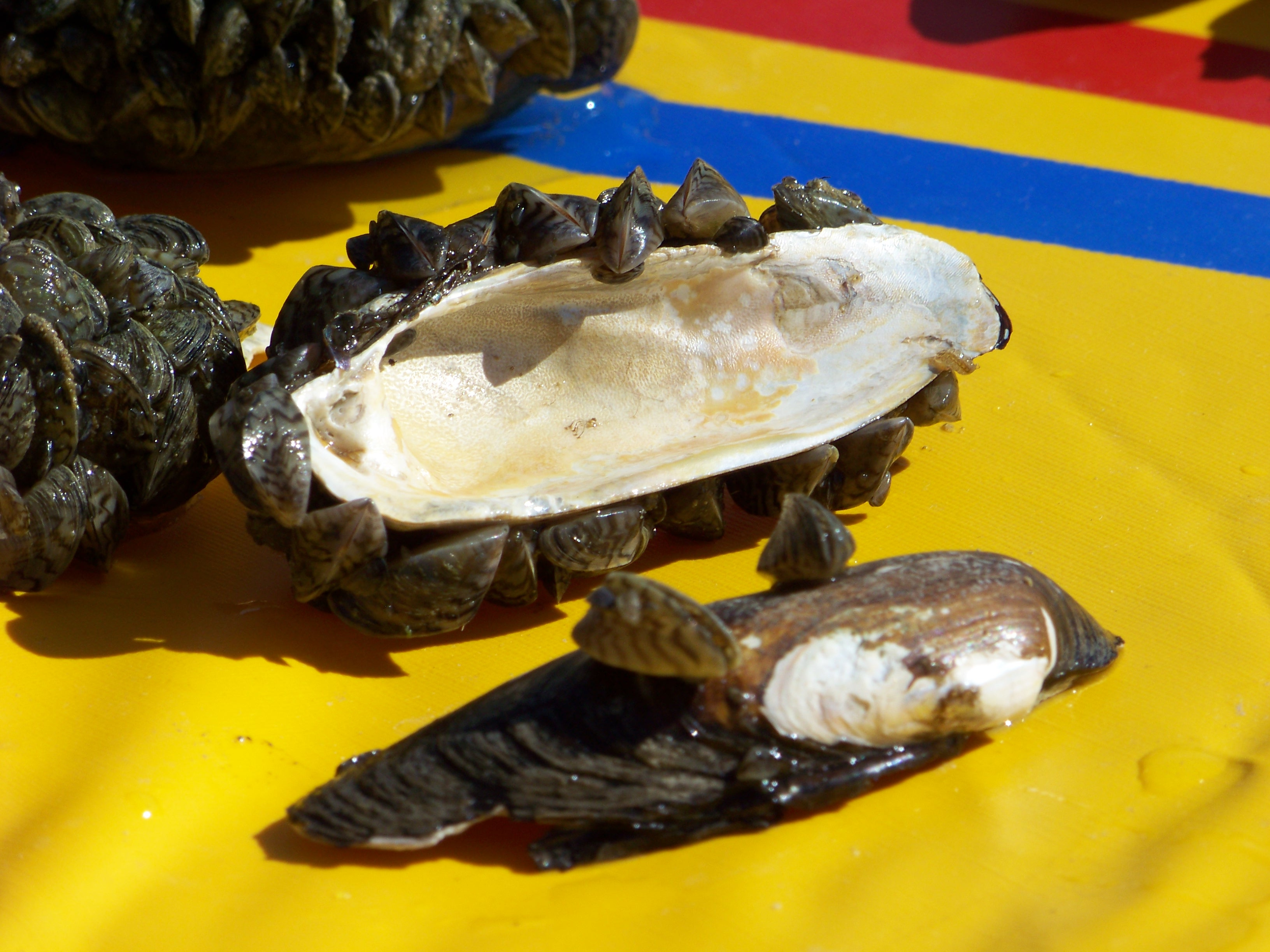 Wandermuschel Ostufer Starnberger See, Schaleninnen- und Außenseite mit Muscheln bewachsen